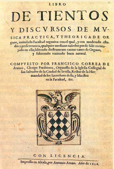 Portada de la Facultad Orgánica de Francisco Correa de Arauxo, obra editada en 1616.